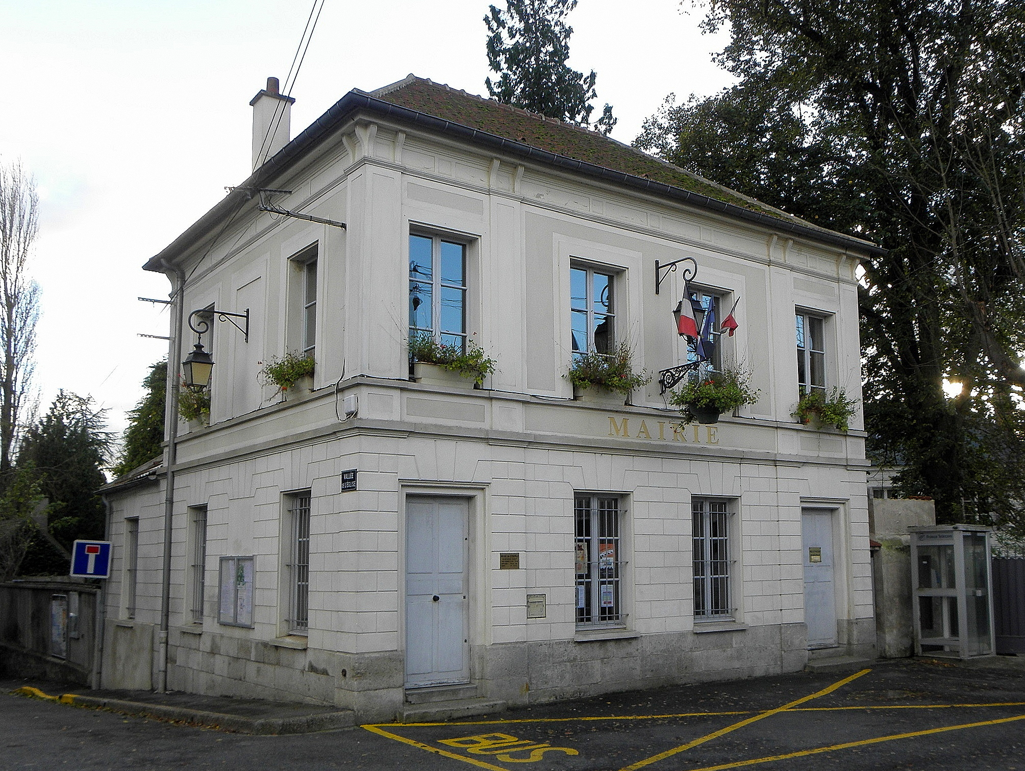 Mairie d'Étrépilly (77).